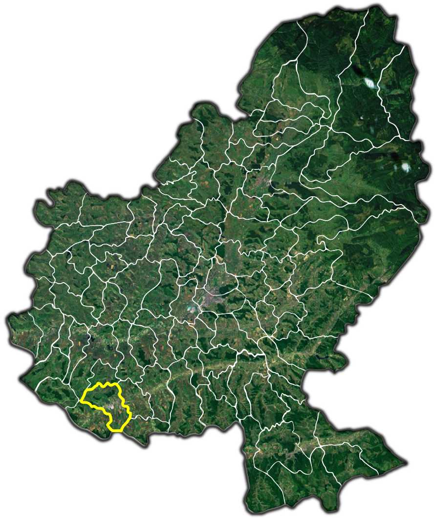 Tarnaveni jud Mures